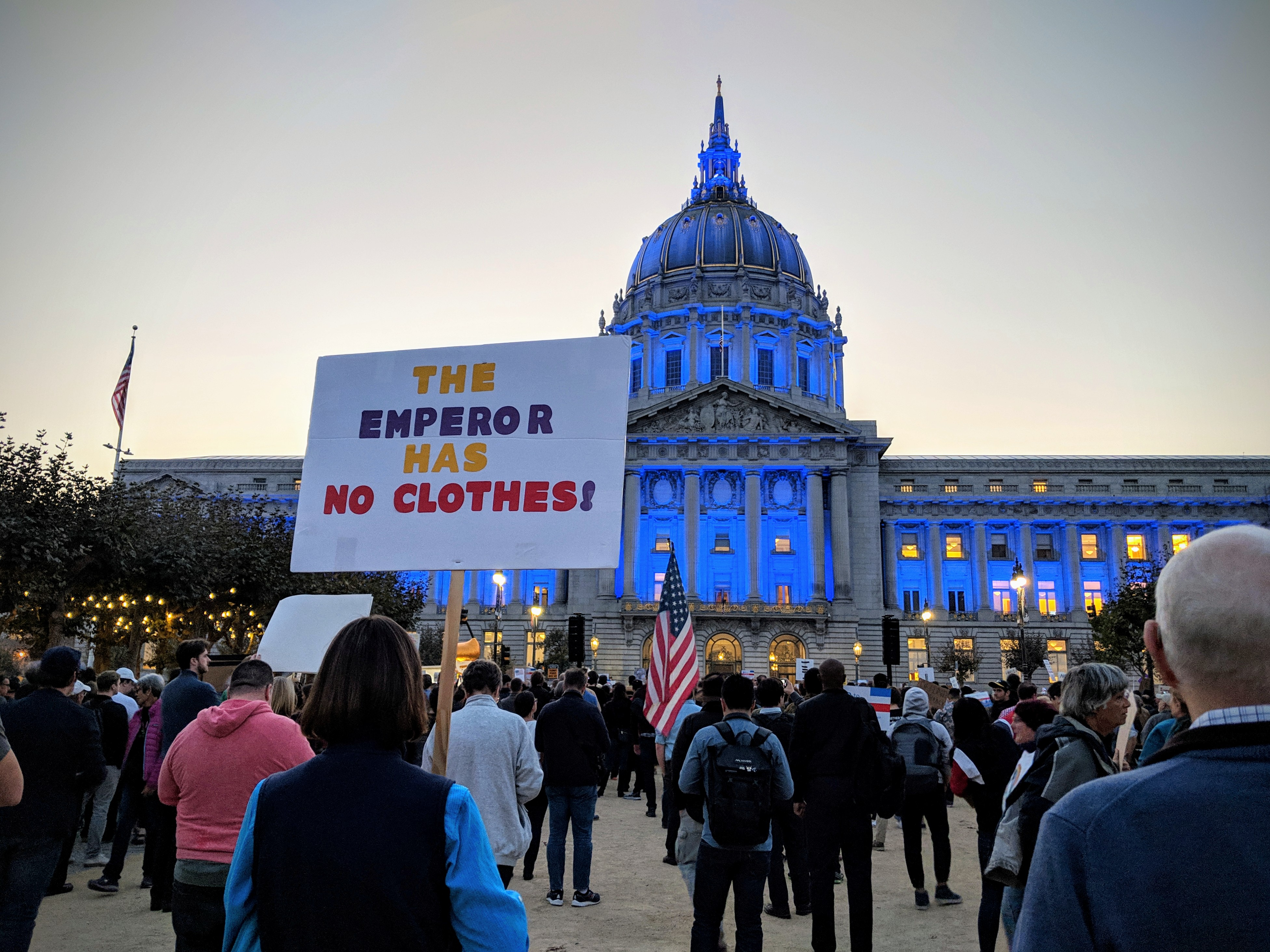 San Francisco, California